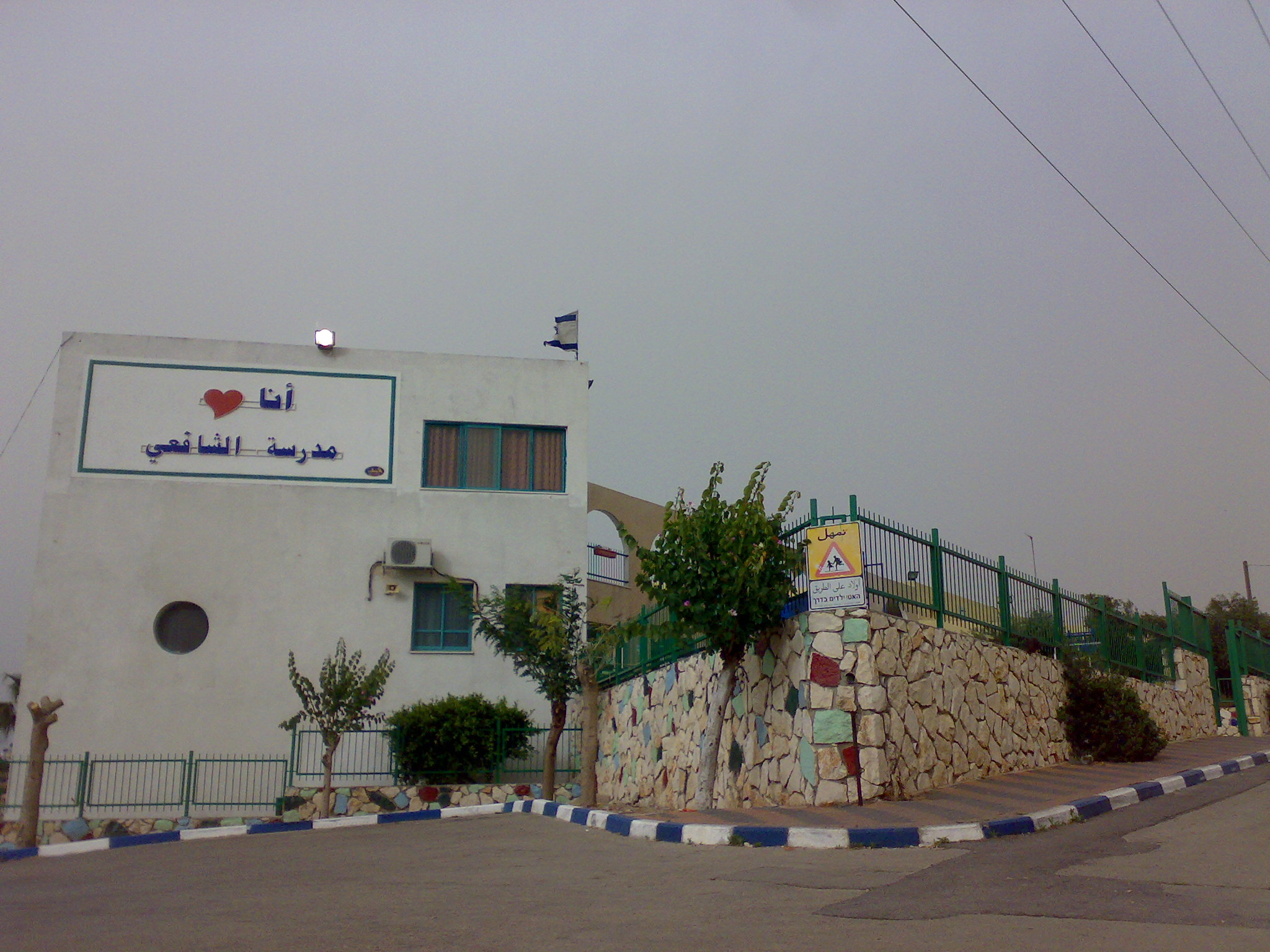 Alshafe'y school in Baqa el gharbiyya.